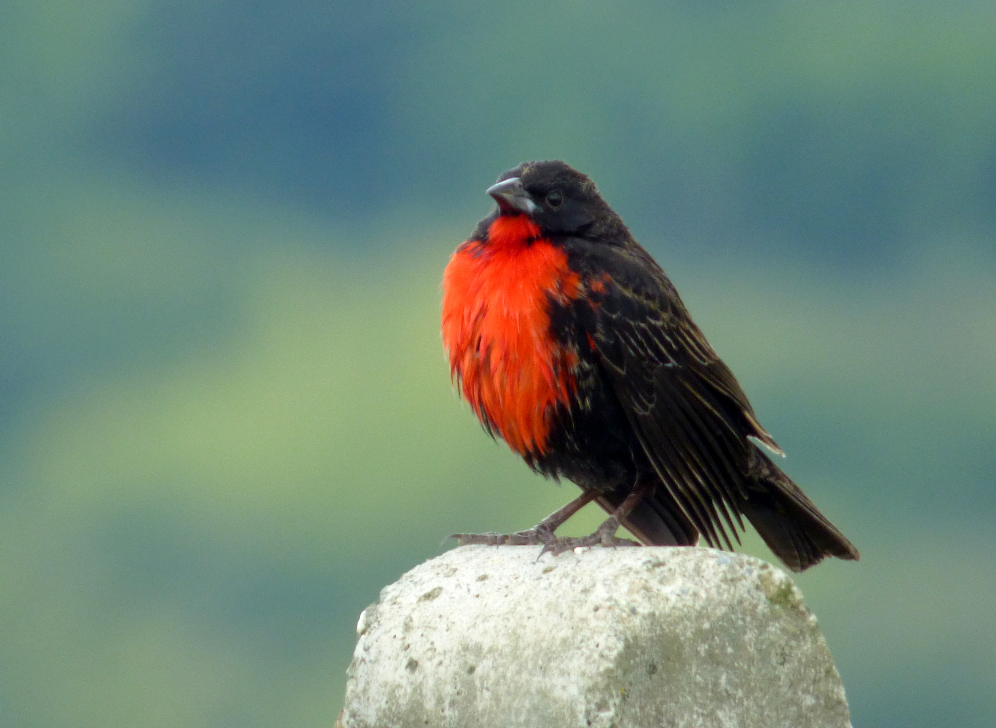 Sturnella militaris (Soldadito)